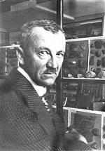 Karel Snětina (1860 - 1942), Český lékař, sběratel a amatérský archeolog.